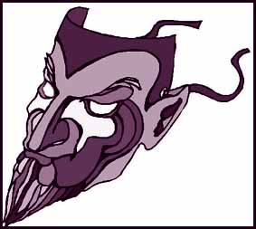 Neuzeitliche Theatermaske für den Darsteller des Mephisto